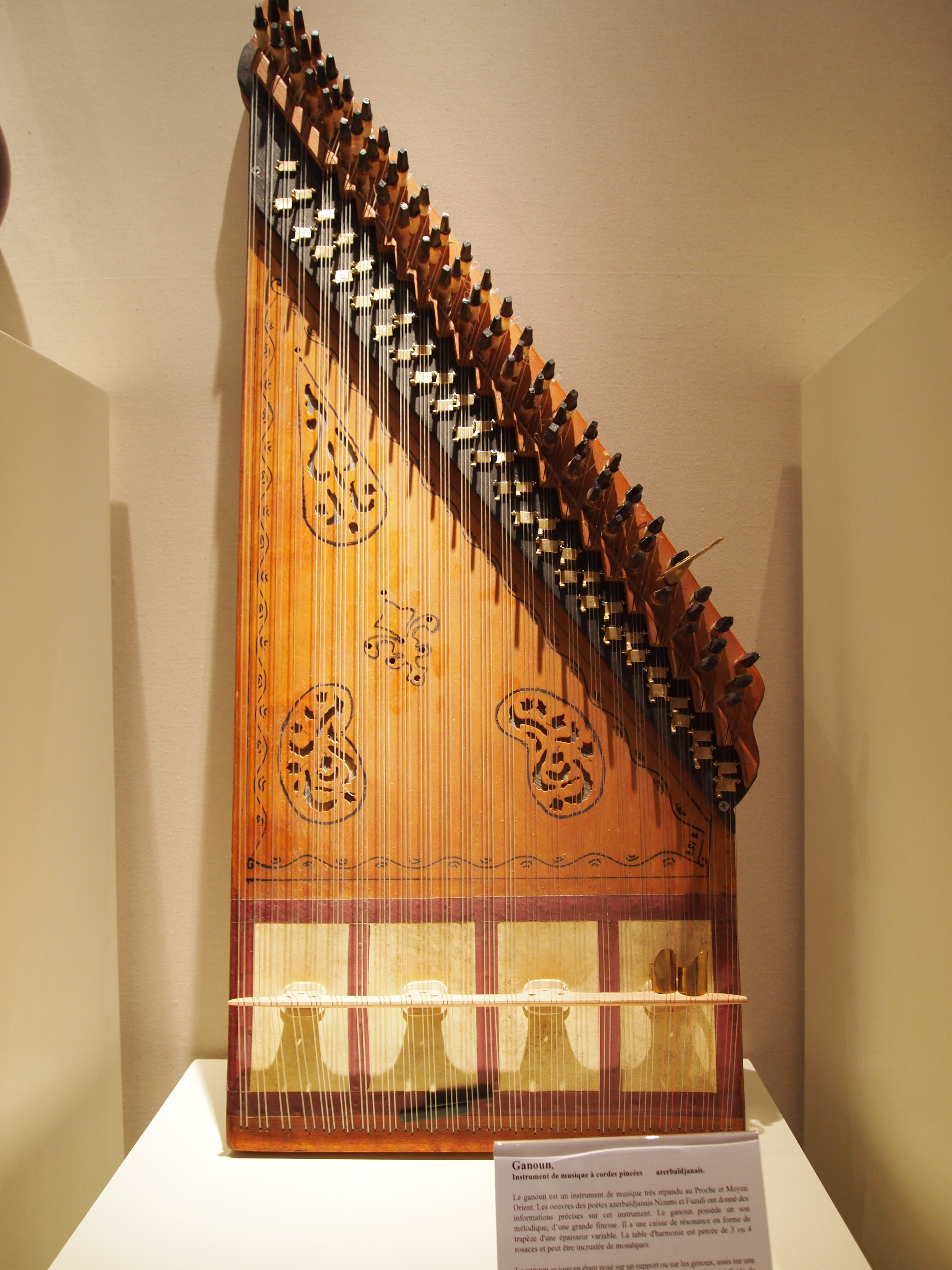 Ganoun, instrument de musique à cordes pincées. Exposition Azerbaïdjan au musée de Cognac nov 2012